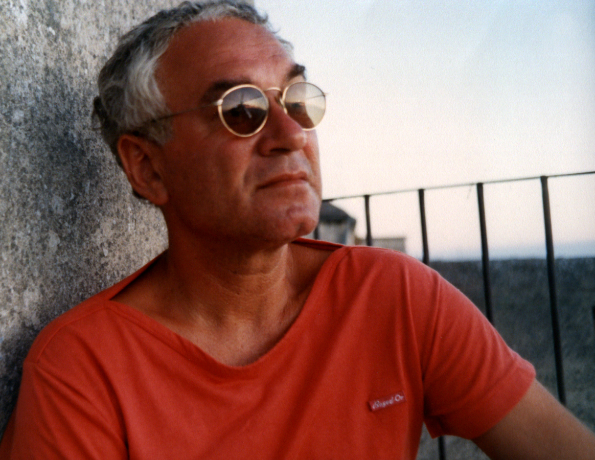 Dan Tsalka. Safed, 1987.